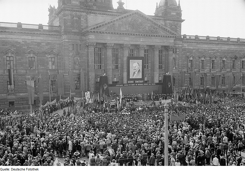 Original image description from the Deutsche Fotothek Tribüne und Teilnehmer der Dimitroff-Ehrung